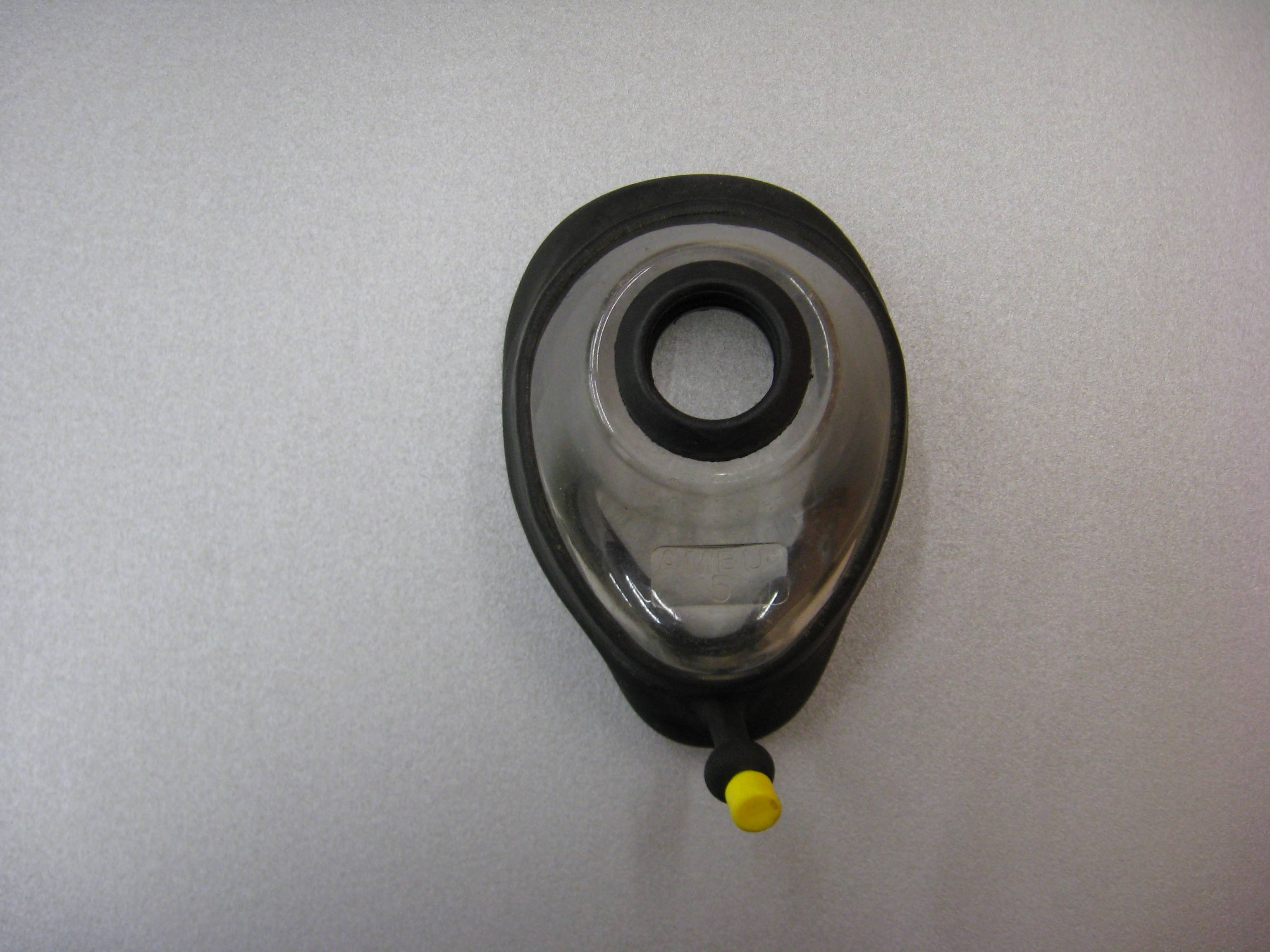 Anesteziološka kiseonička maska. Autor dr Milorad Dimić, 23.februar 2010.